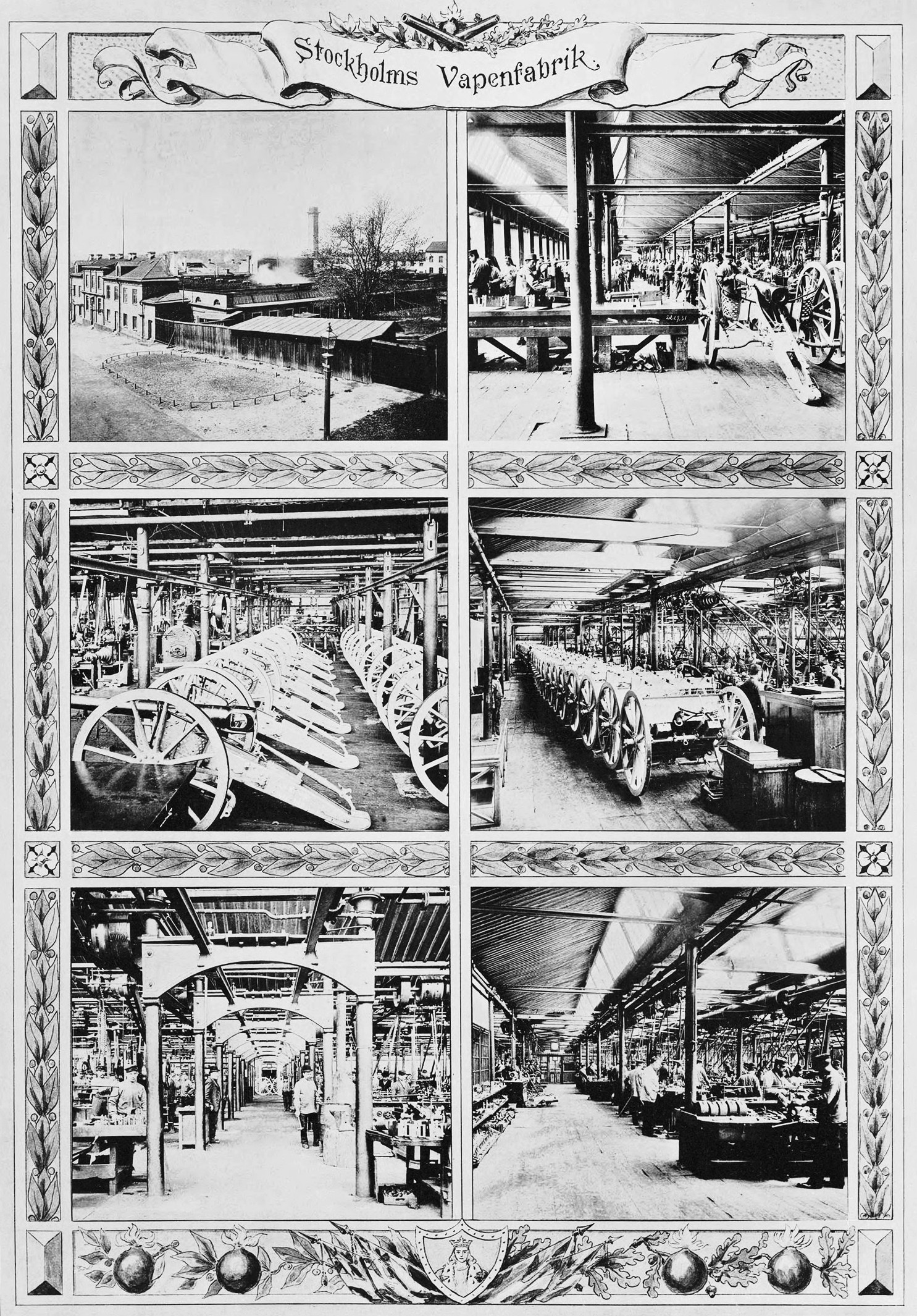 Stockholms Vapenfabrik